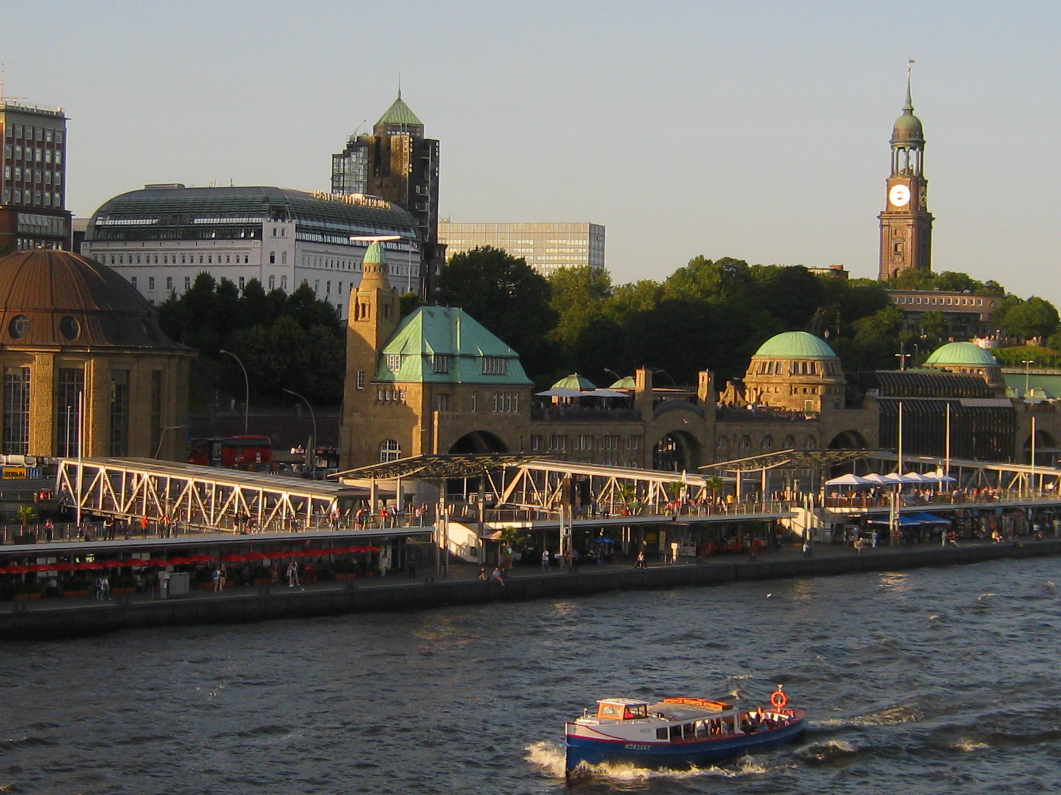 Fotografie der Landungsbrücken in Hamburg-St. Pauli von Bord des MS Deutschland